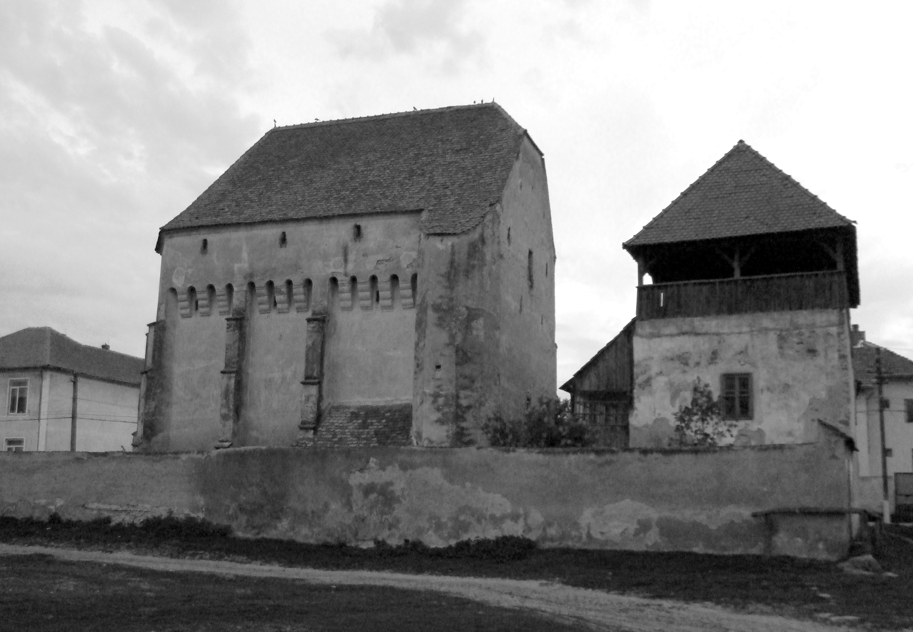 Wehrkirche und Glockenturm mit Pfarrhaus in Boz (Bußd), Alba, Siebenbürgen, RumänienRomână: Biserica fortificată şi turnul clopotniţei cu casa Pastorului din Boz (Bußd), Alba, Transilvania, România